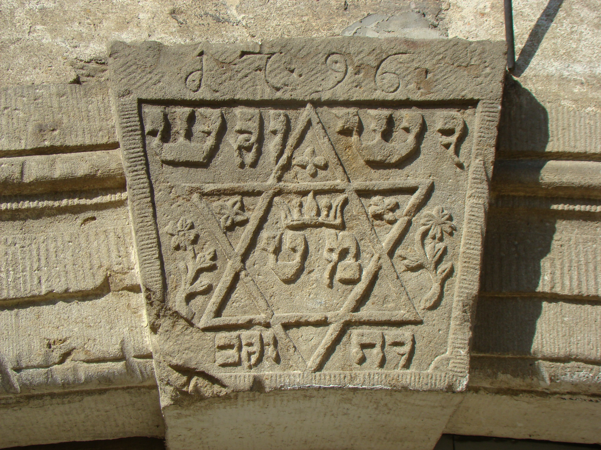 Hochzeitsstein der Synagoge in Heinsheim Inschriften: 1796; "מט" für "מזג טוב"